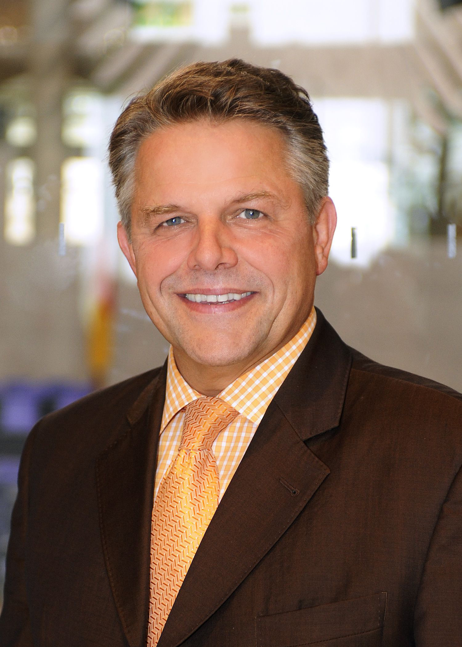 Klaus-Peter Willsch, MdB (2008)